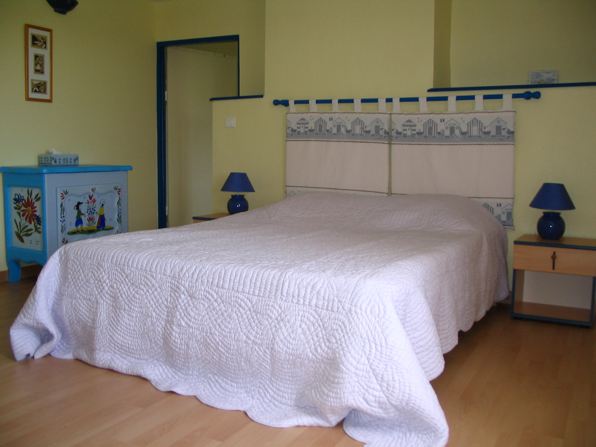 Les Dorlotines, chambres d'hôtes à Rupt sur saône